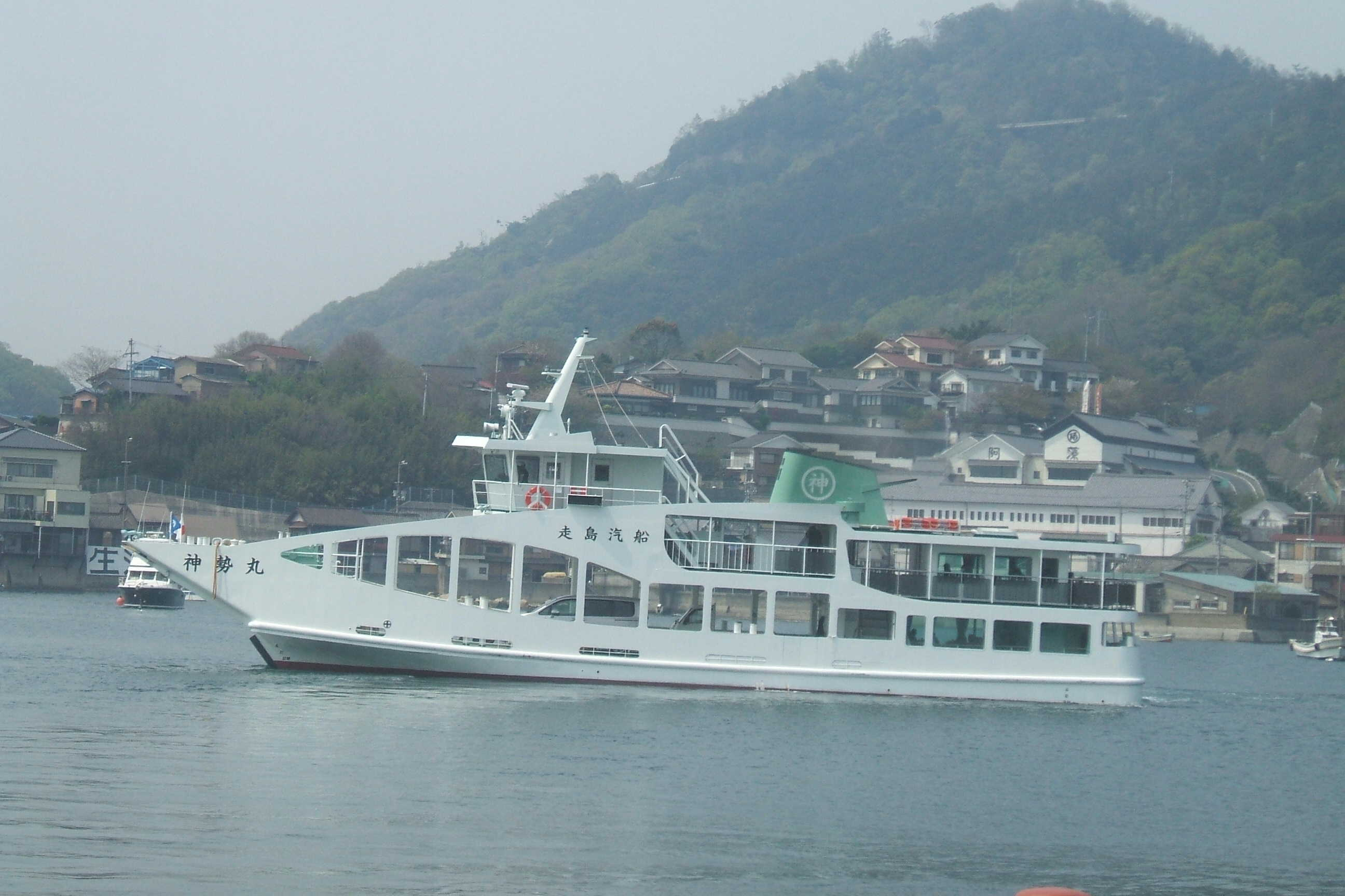 広島県福山市にある走島汽船所属の神勢丸。2012年就航直後に鞆港で撮影